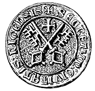 Altes Siegel der Stadt Riga